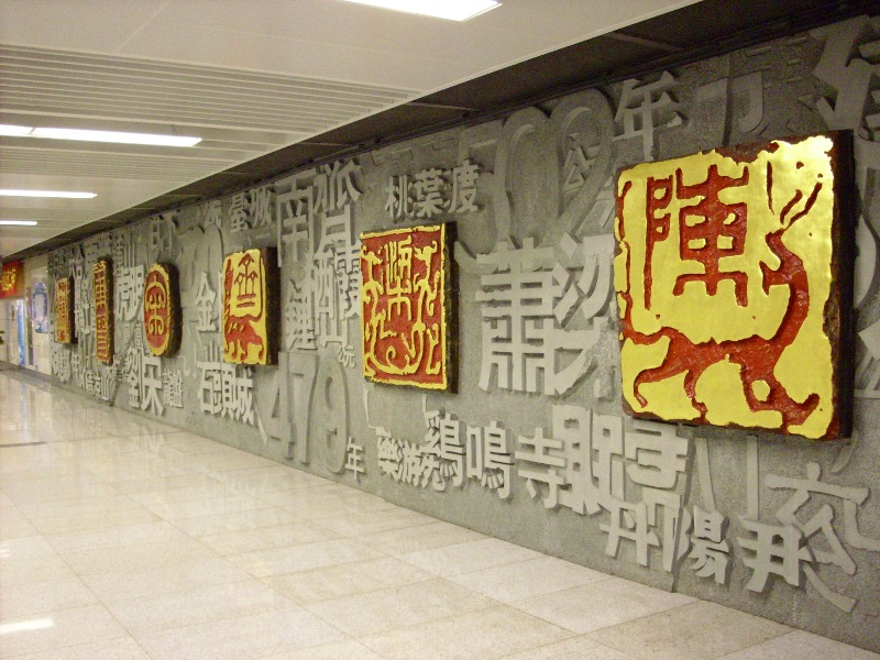 南京地铁一号线鼓楼站主题：六朝